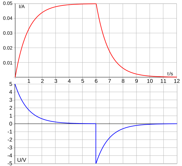 Inductor switch-on-off: I ( t ) {\displaystyle I(t)} (red) and U ( t ) {\displaystyle U(t)} (blue) U ( t ) = − L ⋅ I ˙ ( t ) {\displaystyle U(t)=-L\cdot {\dot {I (t)} with L = 100 H , R = 100 Ω , U 0 = 5 V {\displaystyle L=100H,R=100\Omega ,U_{0}=5V} Original work made by user Klaus-Dieter Keller